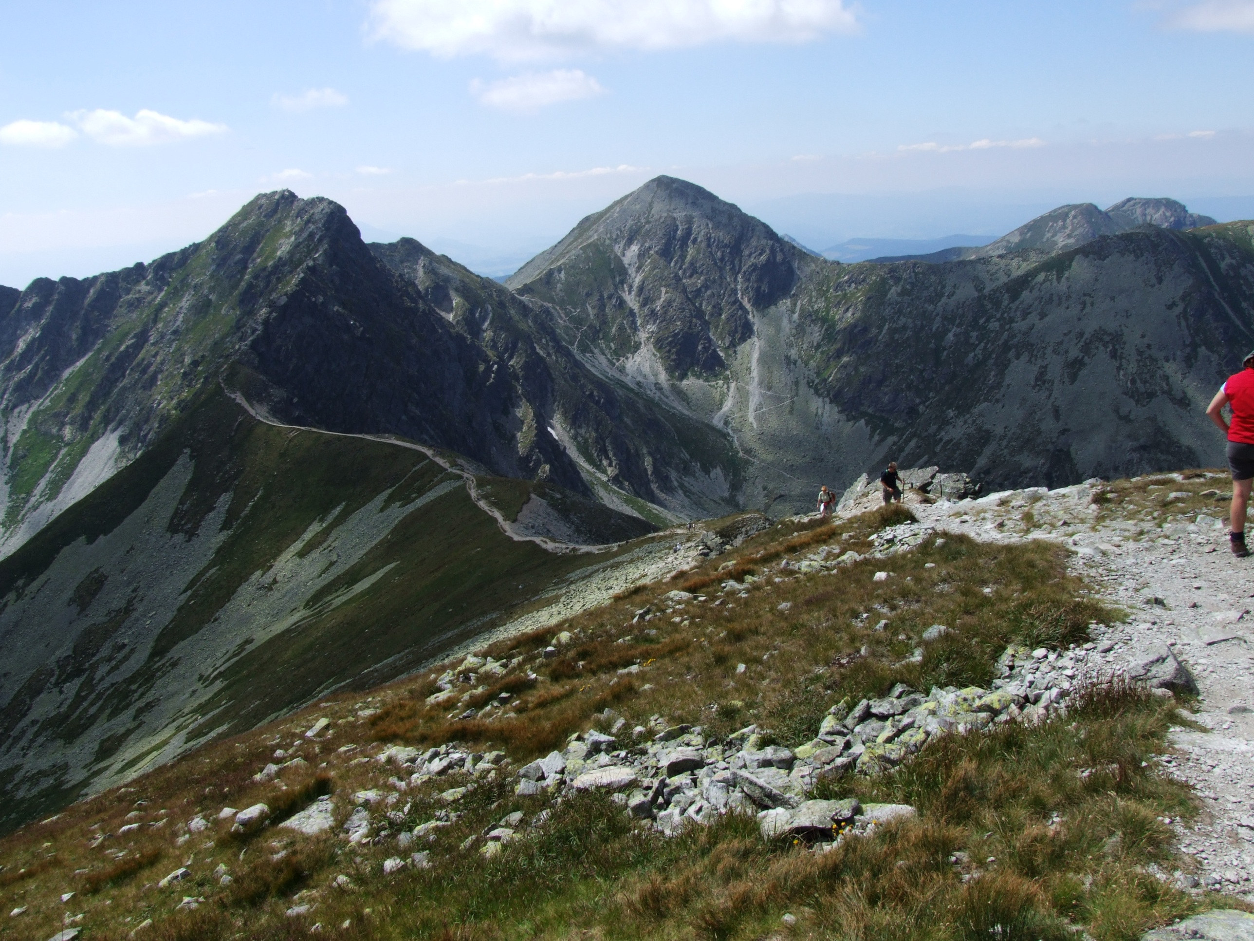 Baníkov, Pachoľa, Spálená (Banówka, Pachola, Spalona Kopa) - West Tatra Mountains